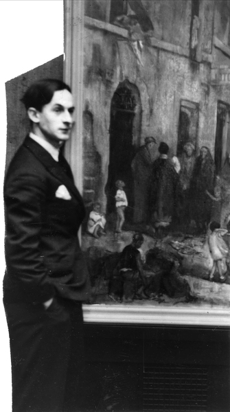 portrett, mann, billedkunstner, kunstmaler, stående knefigur ved maleri.